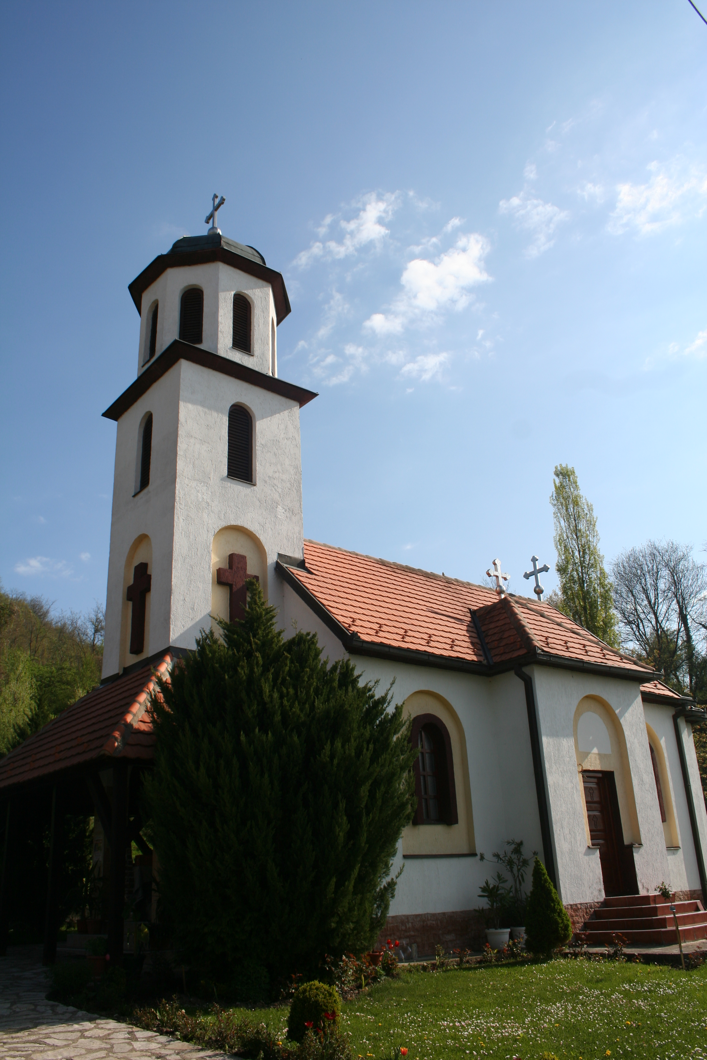 Manastir Bjele vode